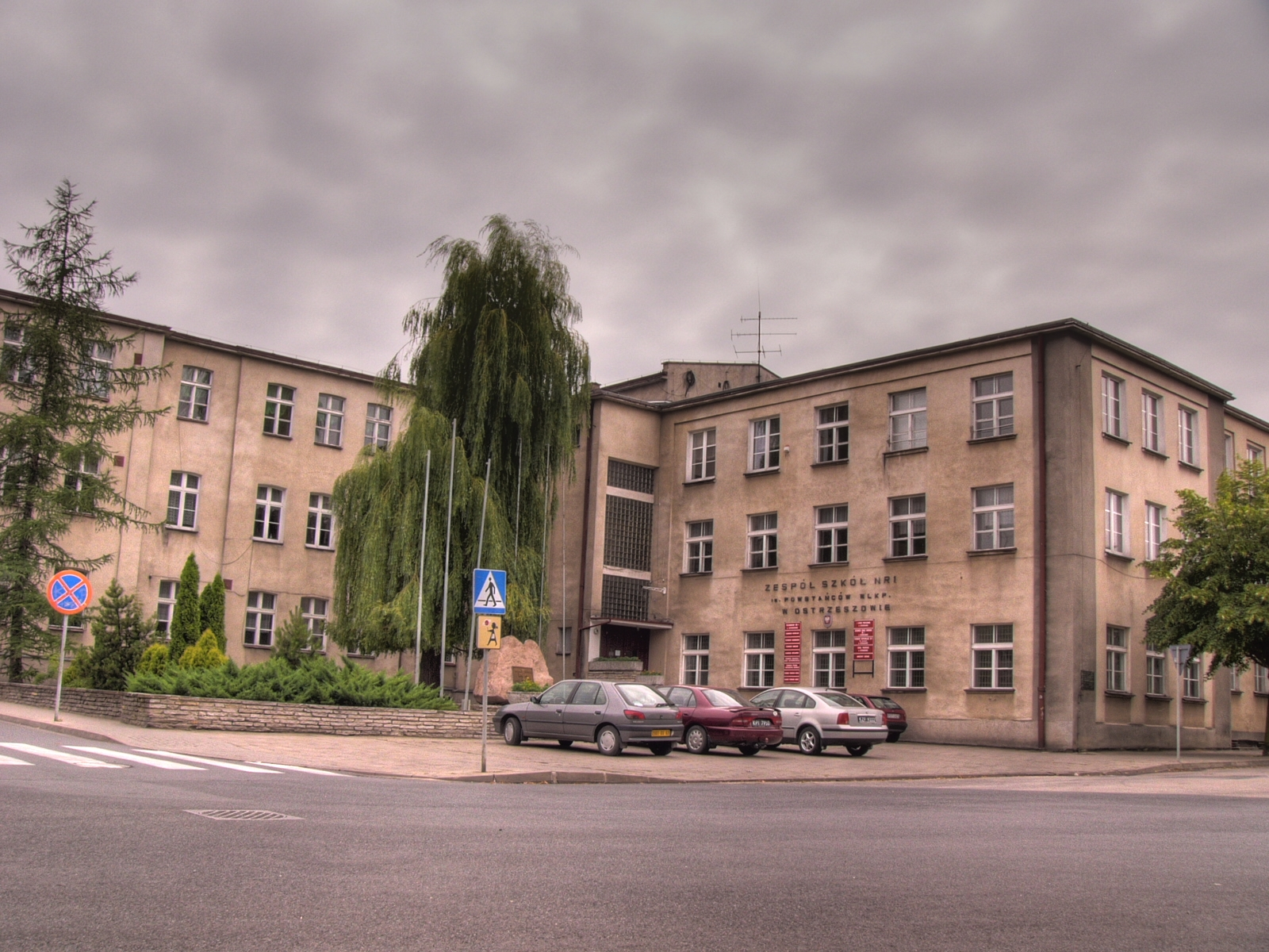 Ostrzeszów, ul. Generała Władysława Sikorskiego 9 - Zespół Szkół nr 1 im. Powstańców Wielkopolskich. Zdjęcie w pełni oddaje charakter szkół